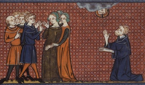 Saint Pelagia. Saint Nonnus prays. (Sainte Pélagie et ses courtisans. Saint Nonnus priant.)